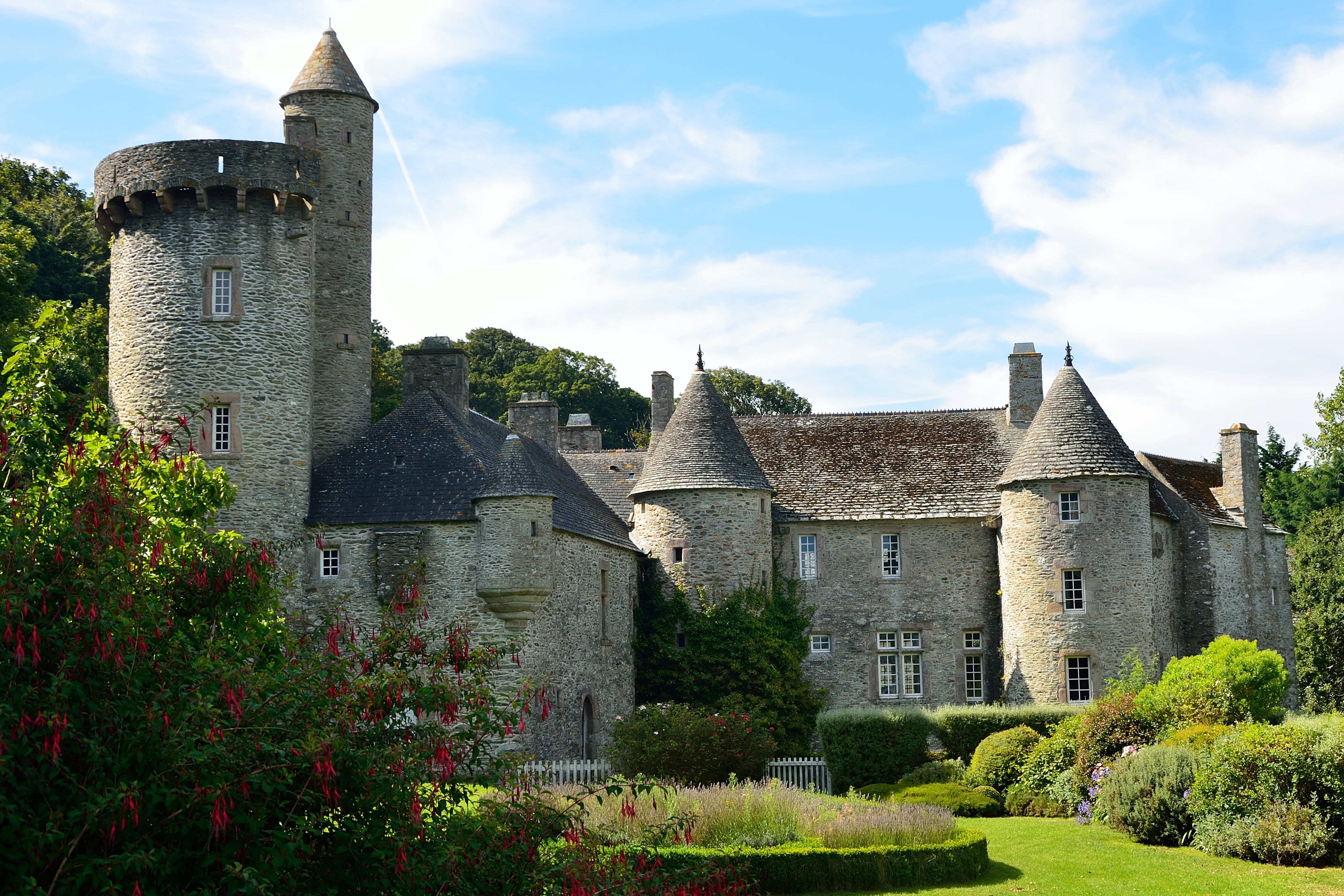 Manoir de Dur-Écu, à Urville-Nacqueville, Manche, Basse-Normandie, France .